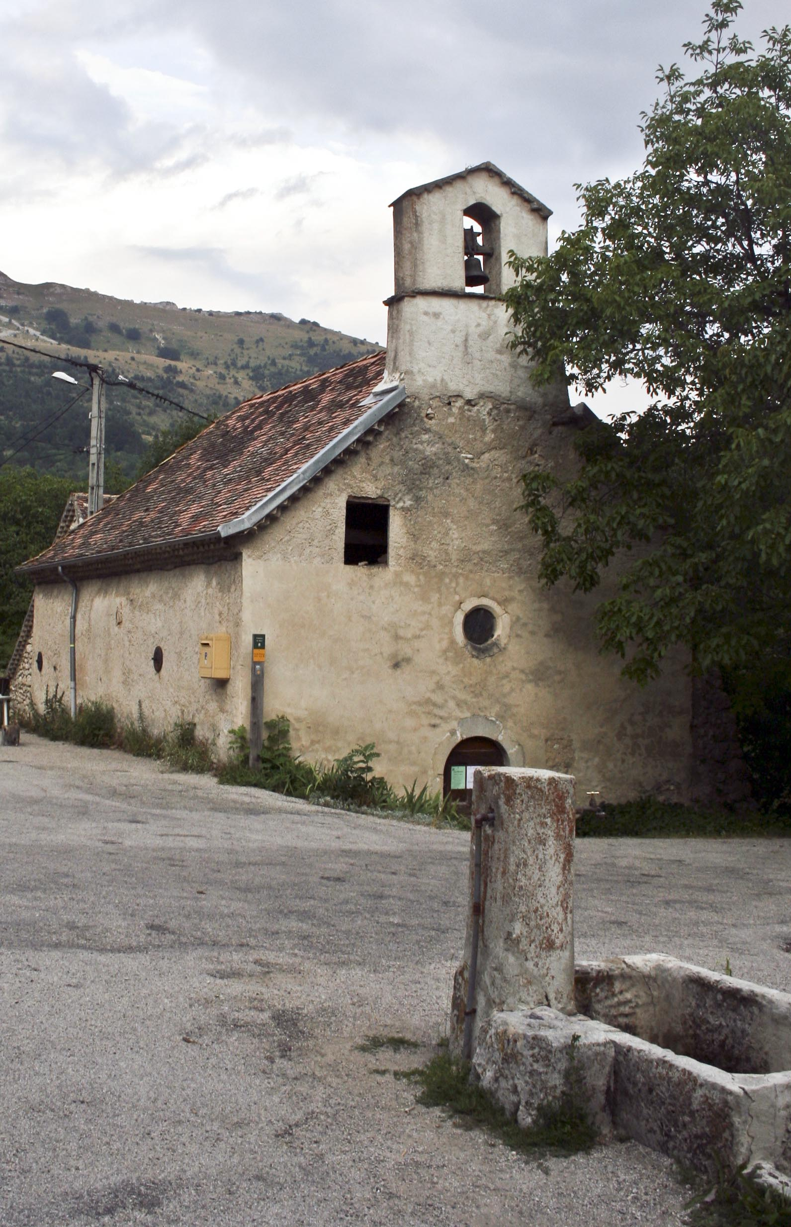 Chapelle du hameau de Grimone, commune de Glandage (Drôme) France